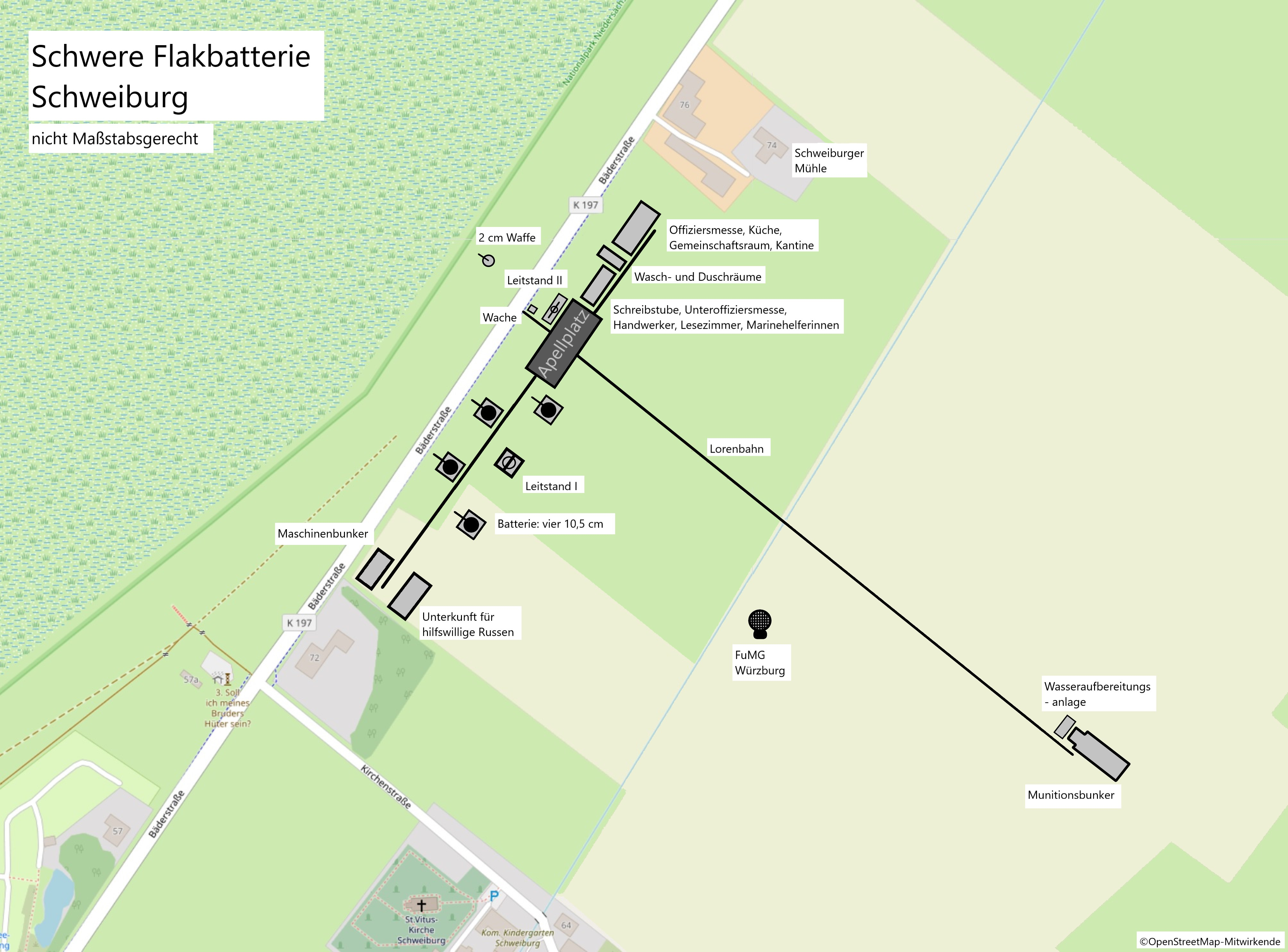 Übersichtskarte der schweren Flakbatterie Schweiburg, eigenes Werk nach Friedrich August Greve